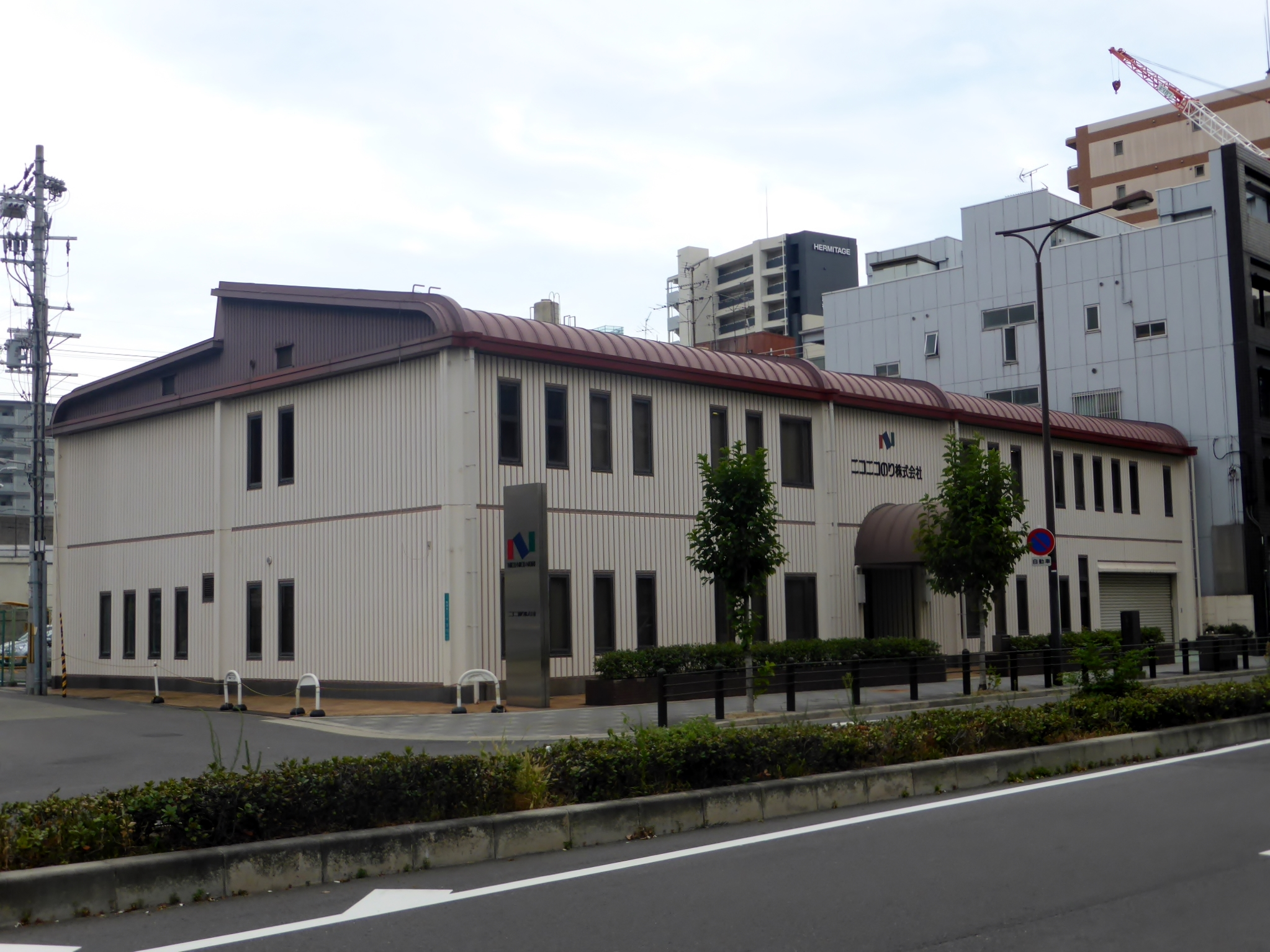 ニコニコのり株式会社本社を撮影